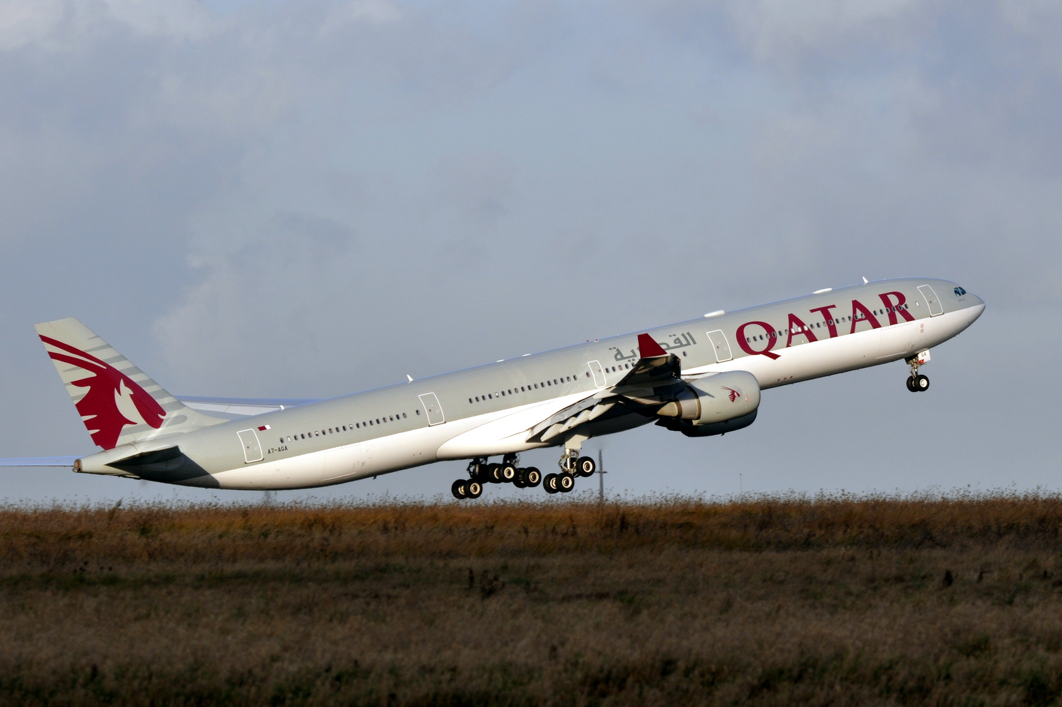 MSN 740 A340-642 QATAR CDG